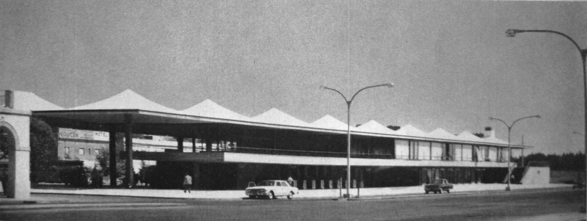 Terminal de Ómnibus de Luján, obra de los arquitectos Llauró y Urgell. Diseñada en 1960, se inauguró en 1966. Argentina.